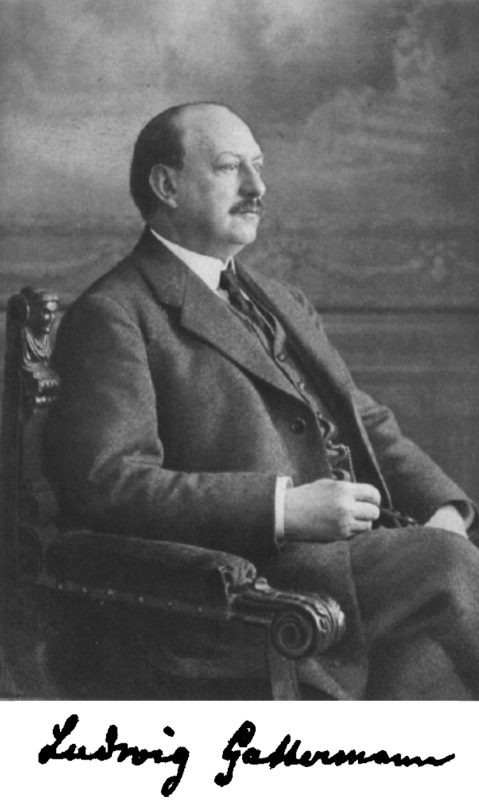 Ludwig Gattermann (* 20. April 1860 in Goslar; † 20. Juni 1920 in Freiburg im Breisgau)